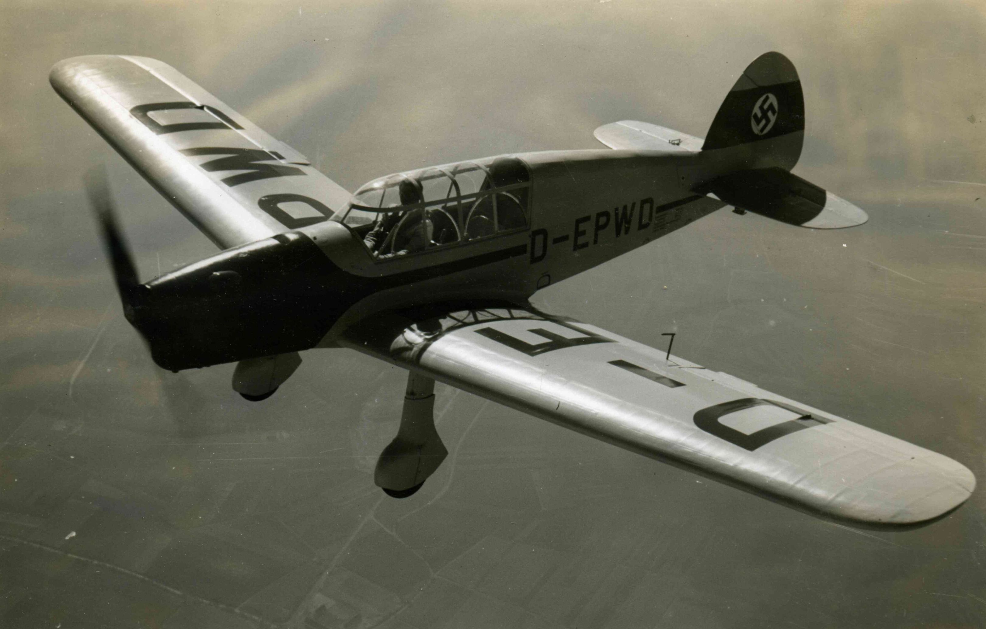 Foto der Fieseler Fi 99 „Jungtiger“, ein Schul-, Sport- und Reiseflugzeug als freitragender Kabinen-Tiefdecker in Gemischtbauweise ausgeführt. Die Flügel nach hinten beiklappbar. Zwei Sitze hintereinander mit Doppelsteuerung. Motor: Hirth HM 506 A mit 160 PS. Entwickelt und gebaut bei dem Fieseler Flugzeugbau Kassel.